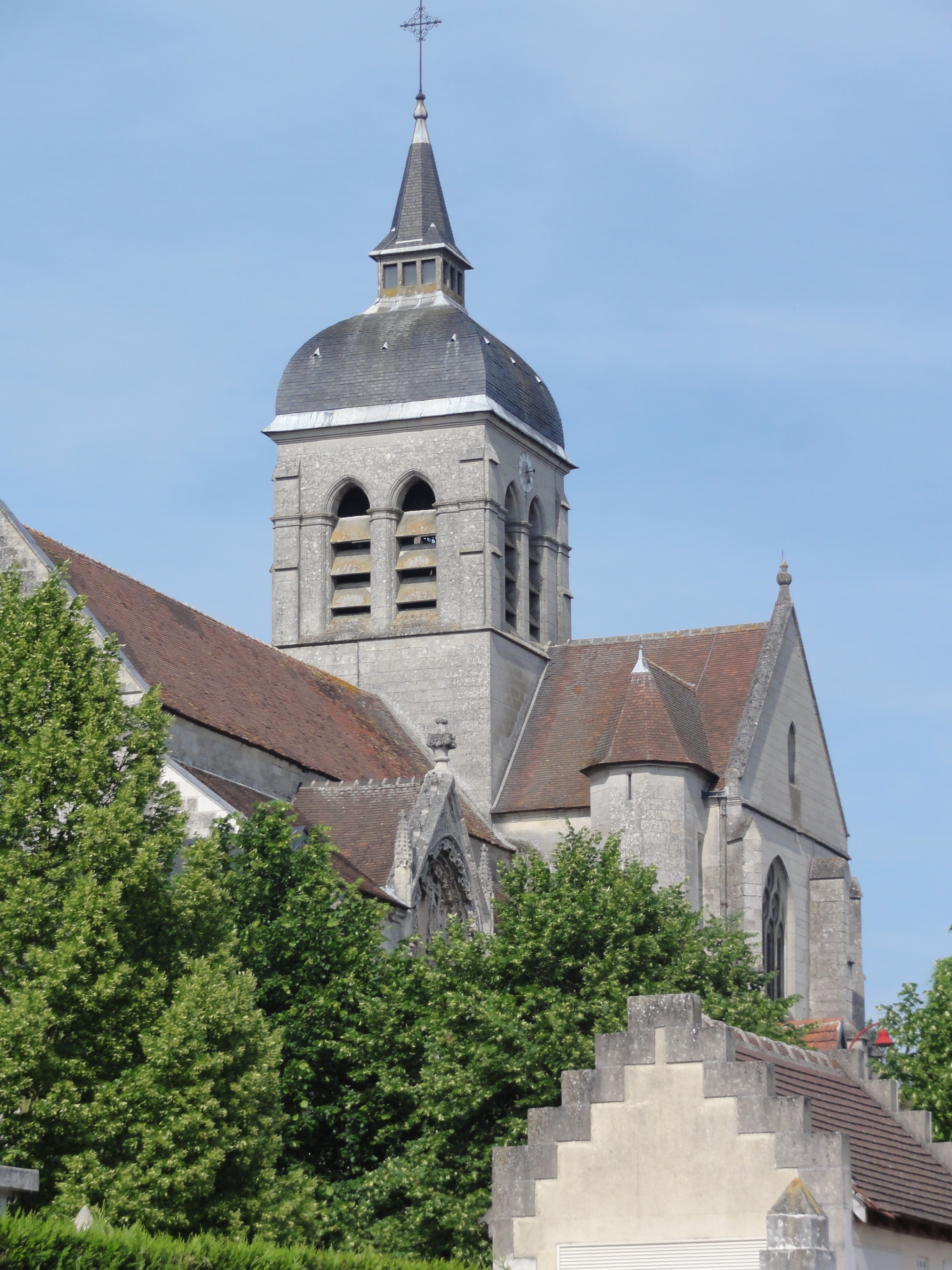 Église Sainte-Radegonde de Missy-sur-Aisne